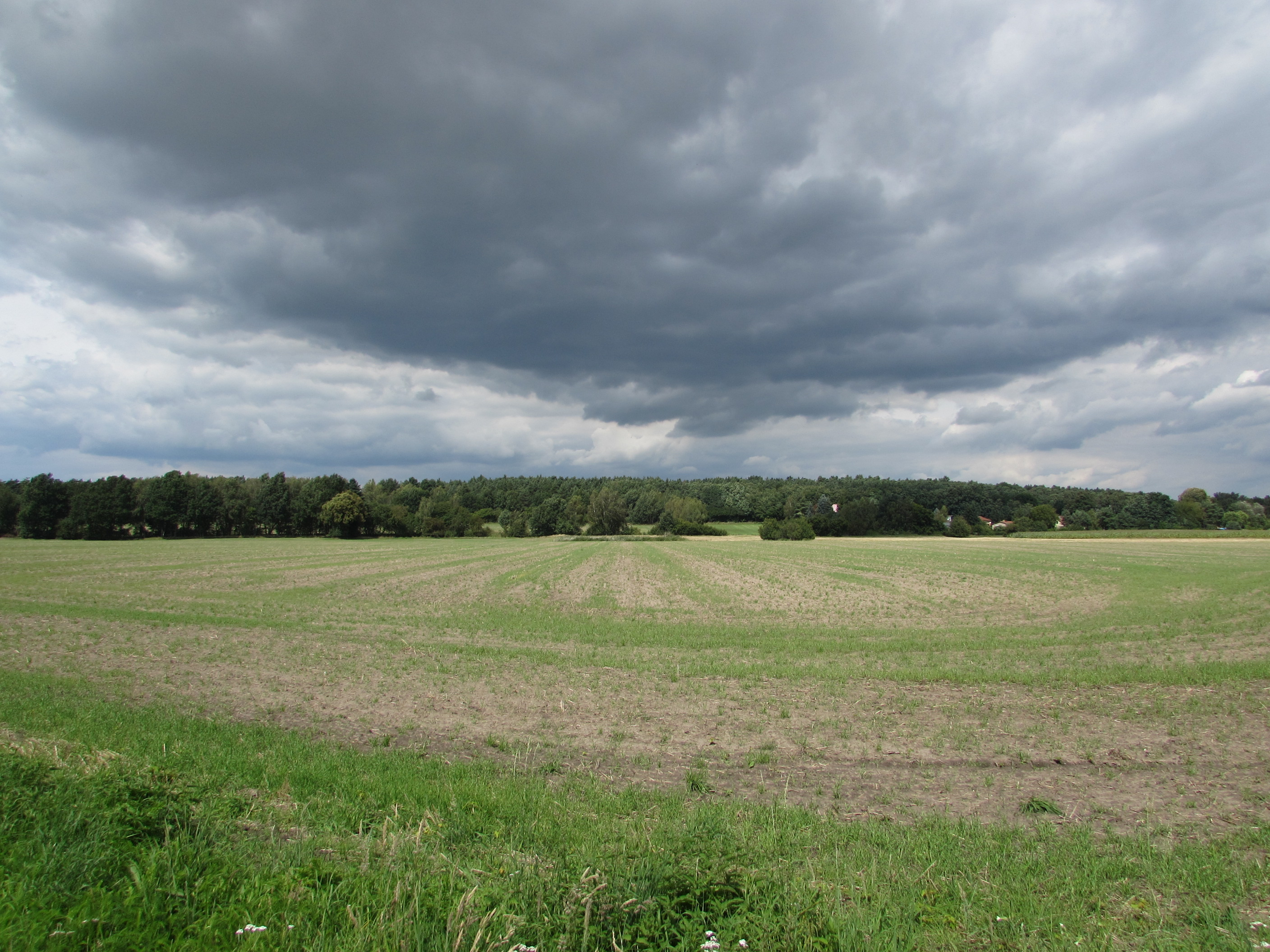 hasselberg zwischen butzow und radewege